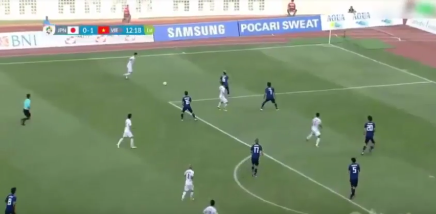 Giành thắng lợi ở trận đấu cuối vòng bảng trước đối thủ mạnh là Nhật Bản giúp Olympic Việt Nam chiếm lấy ngôi đầu bảng D.